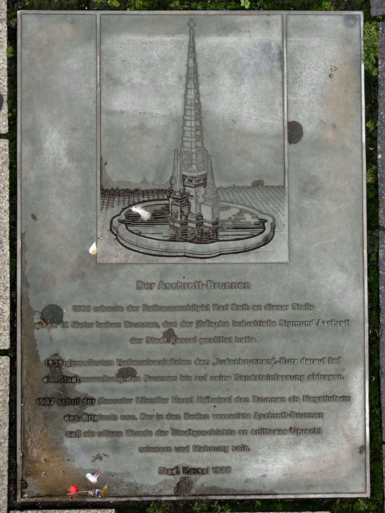 Aschrottbrunnen